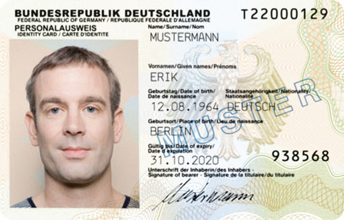 Muster nPA von Erik Mustermann